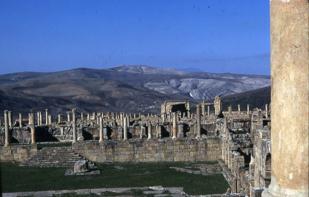 Ruines romaines de Djémila, Algérie